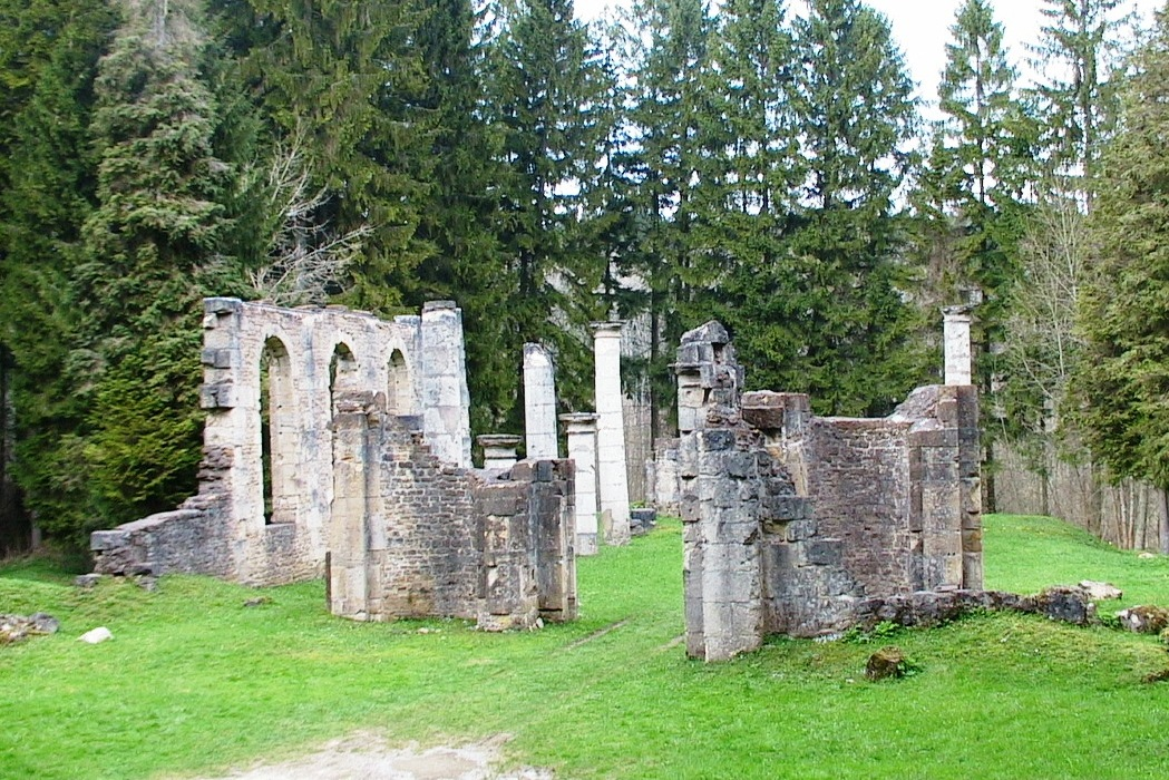 D'Ruine vun der Kierch vun Ornes Object location49° 15′ 09.64″ N, 5° 28′ 01.98″ E Quell: fr Wiki vum F5ZV Geschnidde vum Les Meloures Ornes